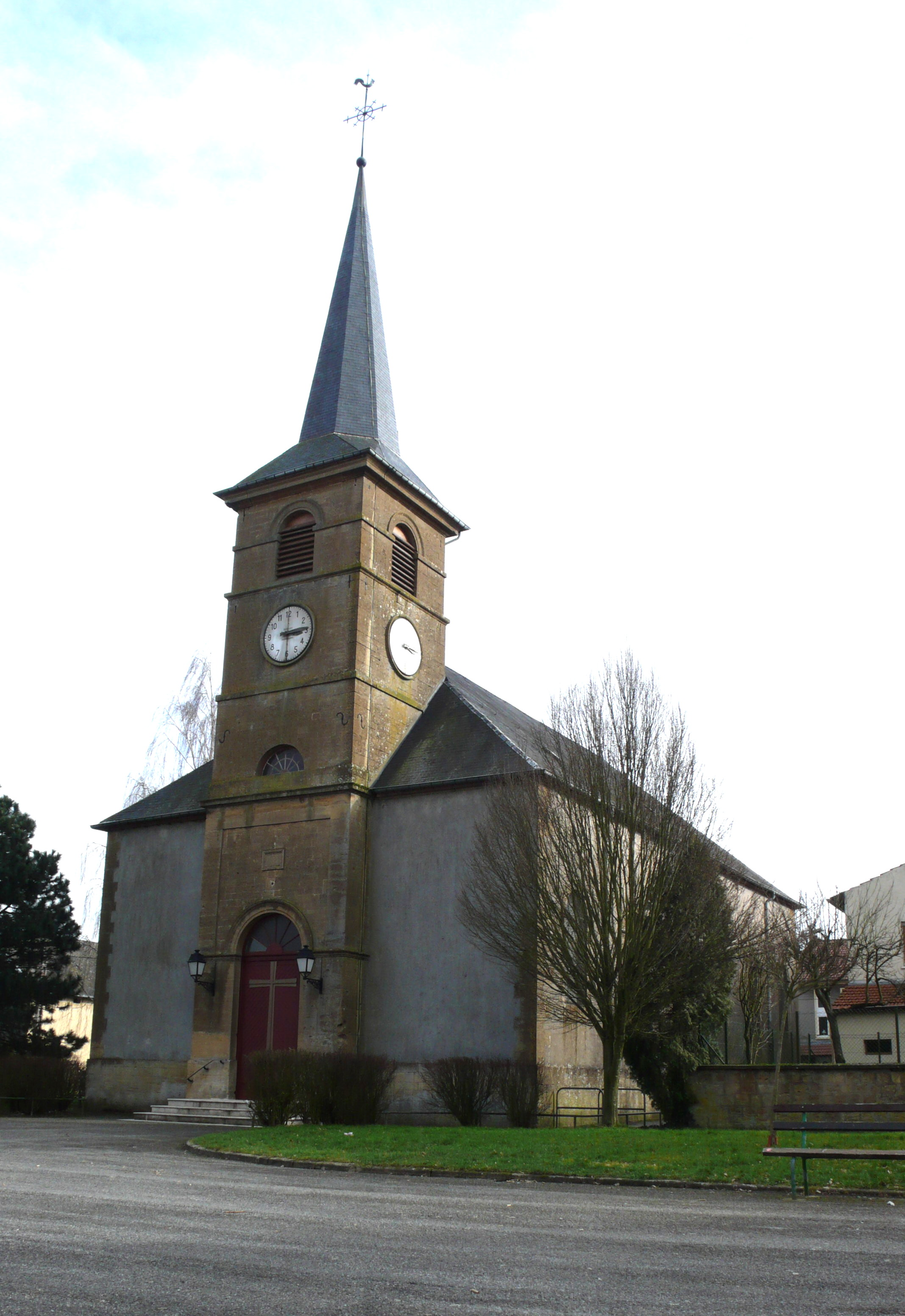 Kierch vun Havalange.